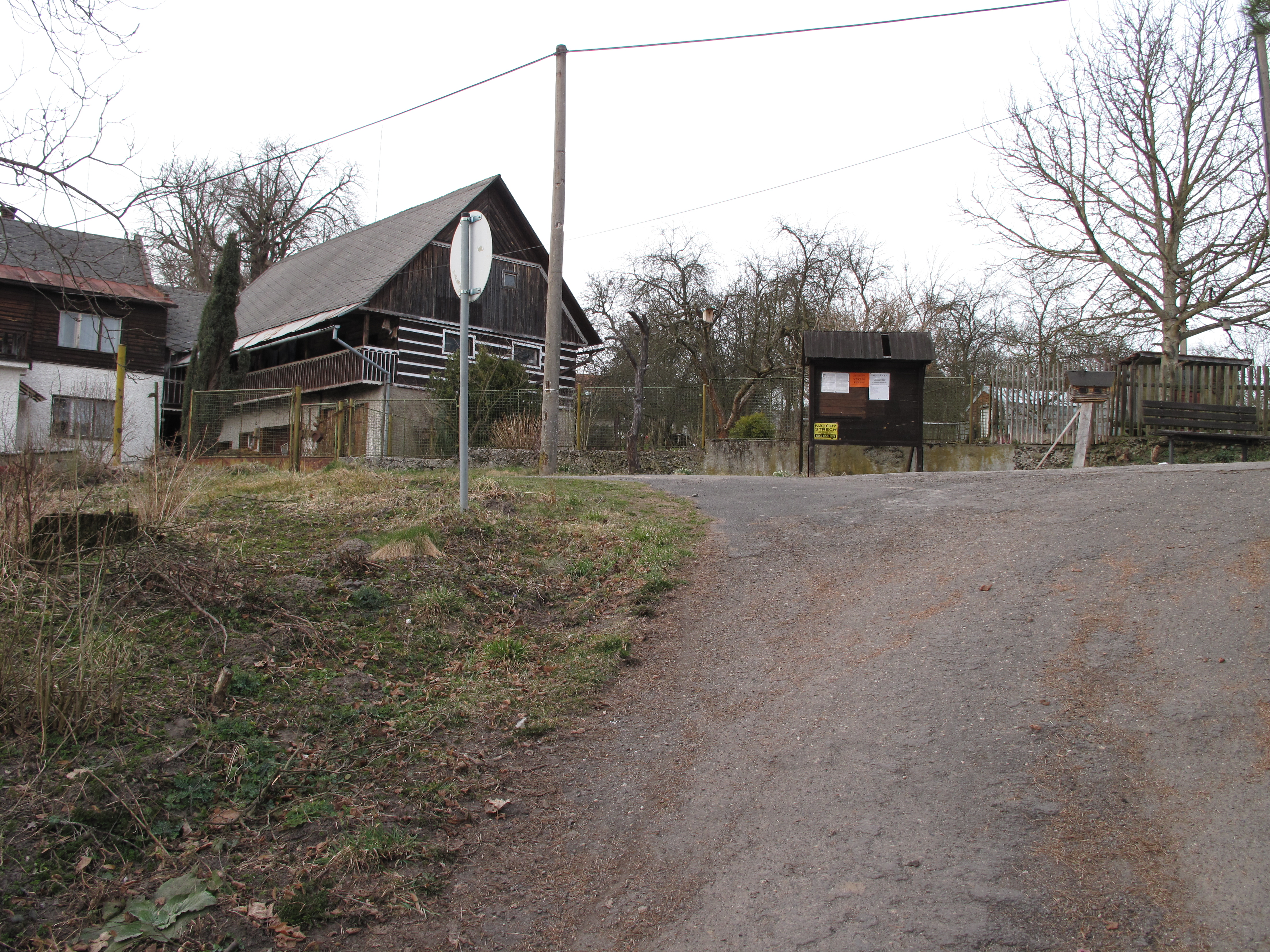 Roubenka v Radvanicích. Okres Liberec, Česká republika.